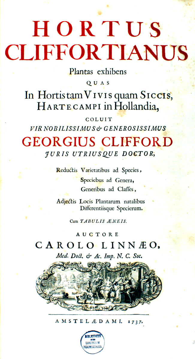 Titelblatt von Carl von Linnés Hortus Cliffortianus, 1. Auflage, 1737